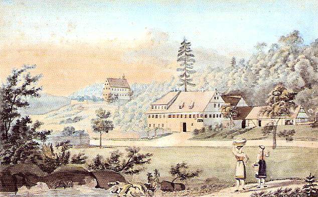 Das Bläsibad und im Hintergrund der Bläsiberg bei Tübingen (Aquatinta / Gouache 15,5 × 25,0 cm; Träger 26 × 34 cm); Schefold 9539